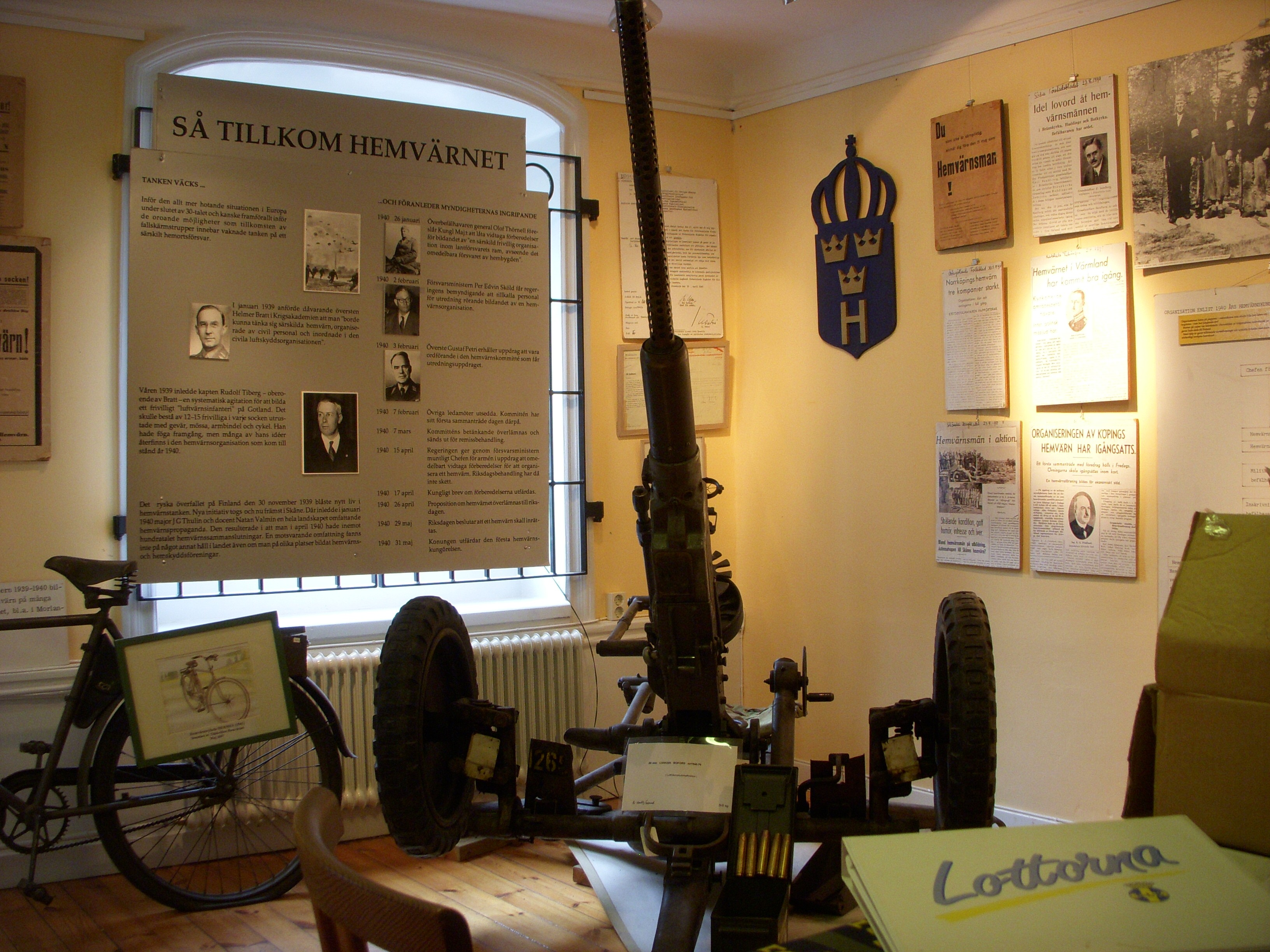 Hemvärnsmuseet i Vällinge